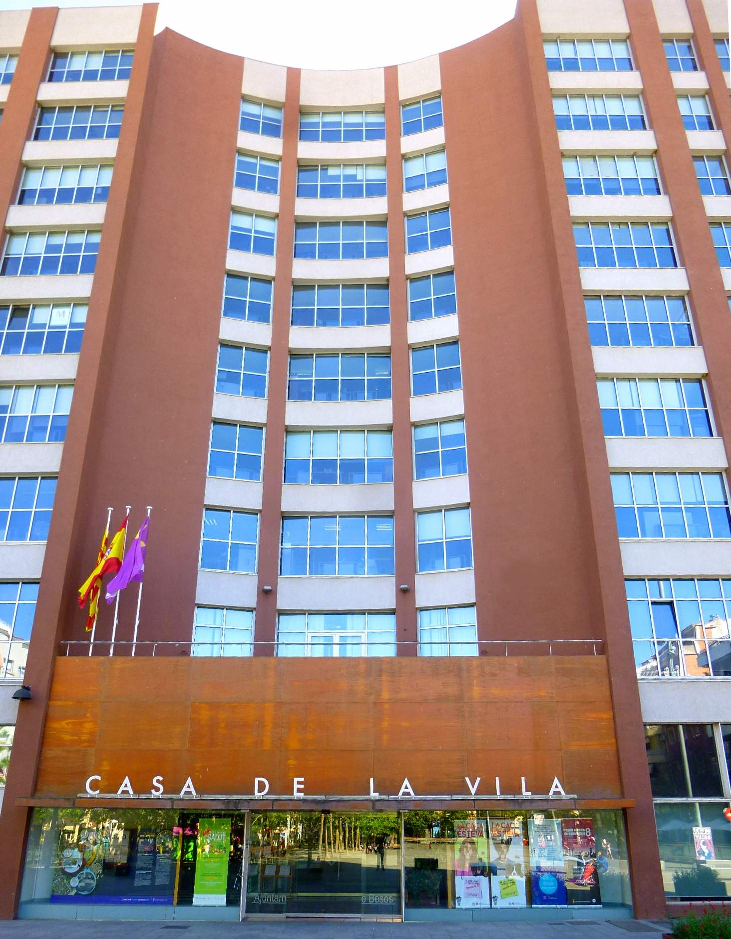 Sant Adrià de Besòs - Ayuntamiento